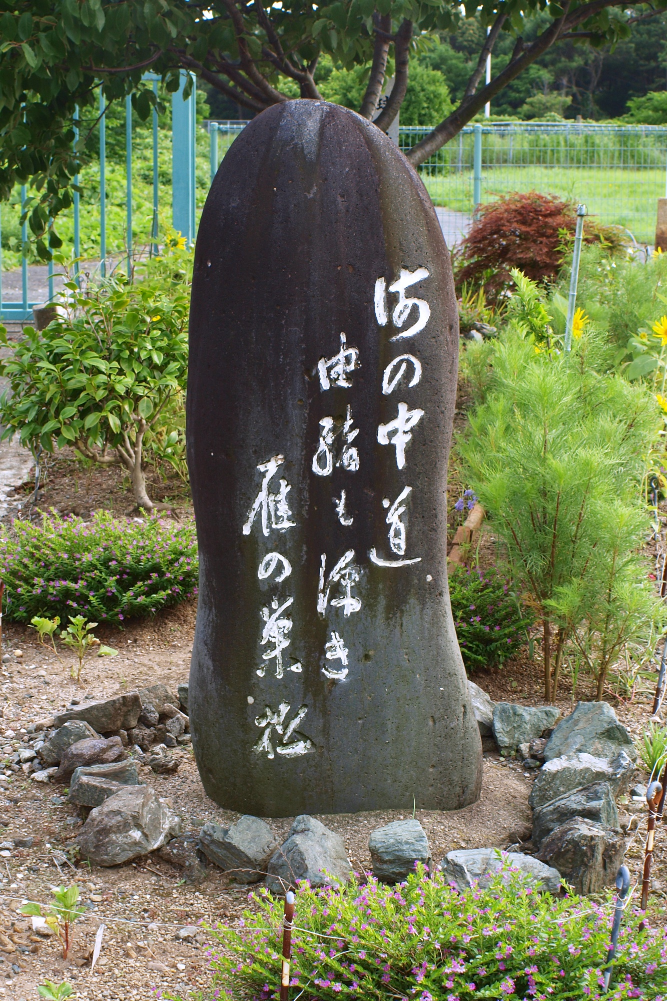 福岡市東区雁の巣 旧福岡第一飛行場（雁ノ巣飛行場）跡地にある記念碑。